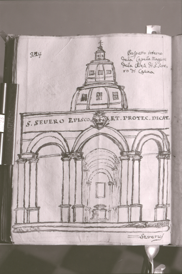 Servizio fotografico : Cesena, 1972 / Paolo Monti. - Strisce: 6, Fotogrammi complessivi: 36 : Negativo b/n, gelatina bromuro d'argento/ pellicola ; 35 mm. - ((Sul portanegativi: NIKMAT PanF. - Riproduzioni di disegni di architettura (palazzi e chiese in particolare) e stampe del manoscritto di Carlo Antonio Andreini, "Tomo IV. Supplemento della Cesena Sacra", 1819? di cui è riprodotta anche la copertina. - Occasione: Campagna di rilevamento (prima) del centro storico. - Fonte: Agenda di Paolo Monti: Leica 1501-3000 Controllo numerazione (1950-1978), presso Archivio Paolo Monti. - Fonte: Monografia di Dradi Maraldi Biagio, Emiliani Andrea (a cura di): Cesena: il volto della città, Cesena, Banca Popolare di Cesena (1973). - Fonte: Fattura di Paolo Monti: IV. Commesse/ Fattura n. 23/ Censimento centro storico di Cesena - fotografie (1972/11/06), presso Archivio Paolo Monti